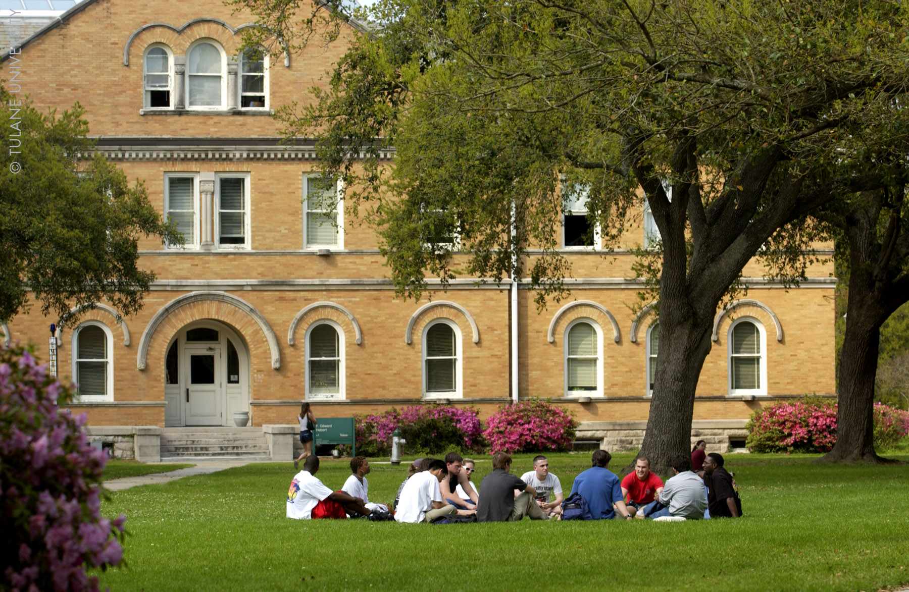 Hebert Outdoor Class